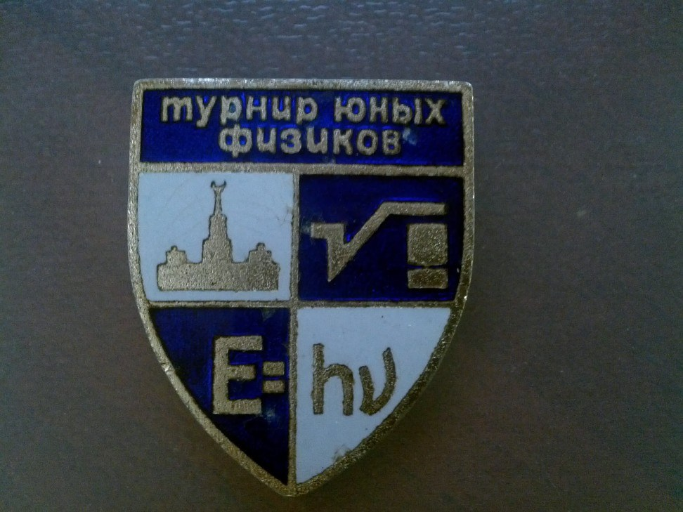 Значок Турнир Юных Физиков